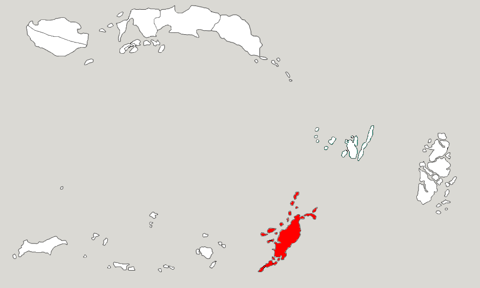 Округ Західне Південно-Східне Малуку